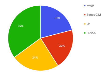 Deuda publica en Venezuela Segnung la Plataforma Auditoria Publica y Ciudadana